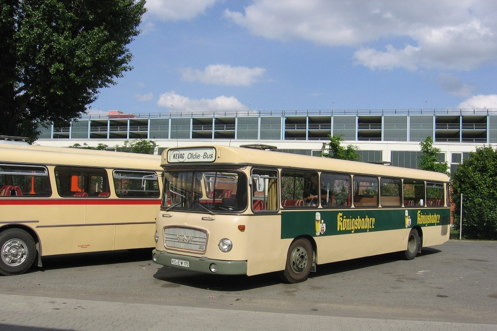 Bus-Ausstellung Betriebshof Frankfurt am Main Rebstock. KEVAG Oldie-Bus.